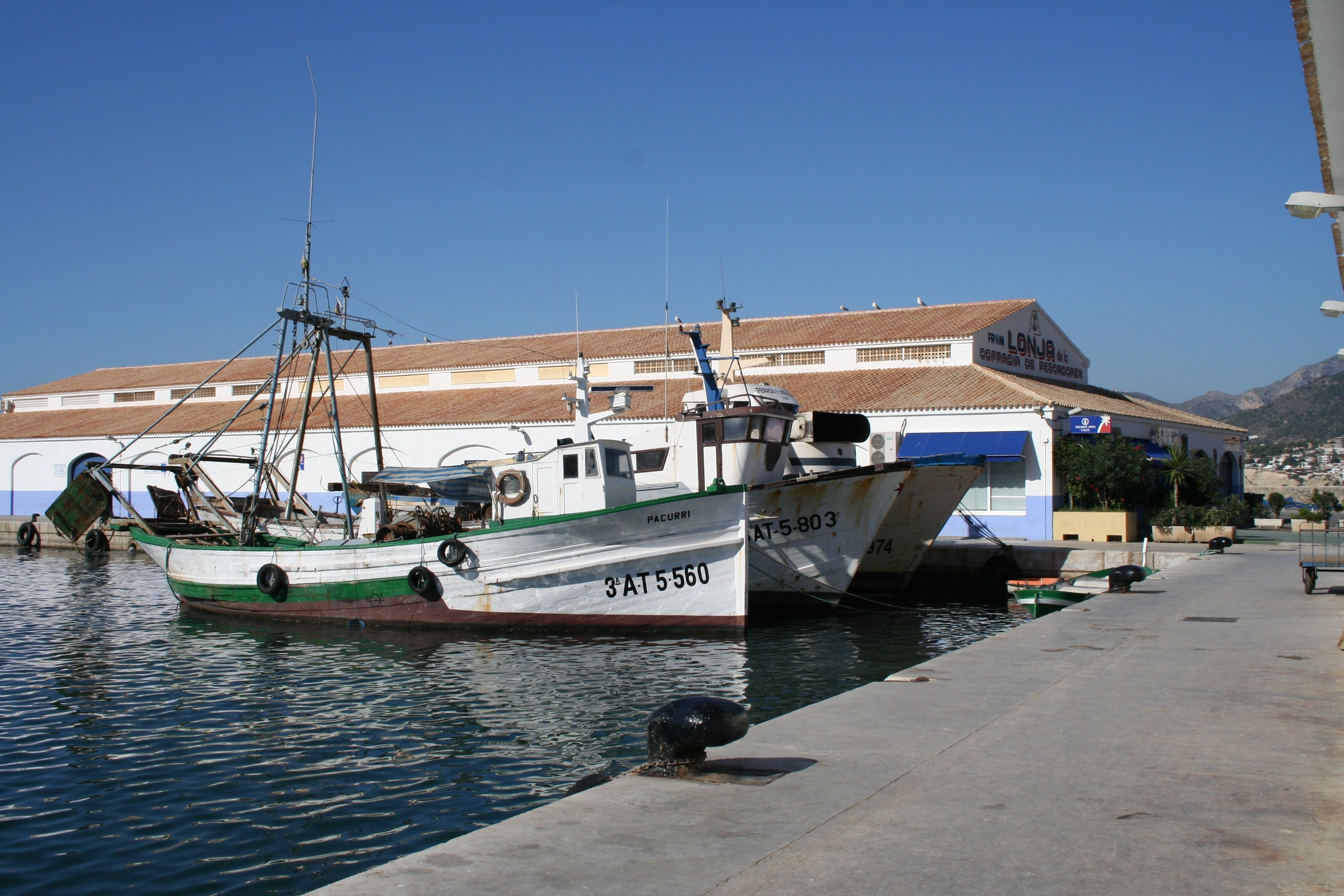 Puerto pesquero y lonja